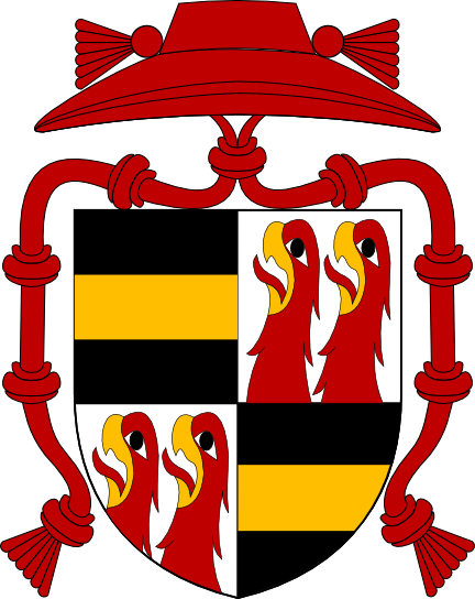 znak kardinála Jana Očka z Vlašimi